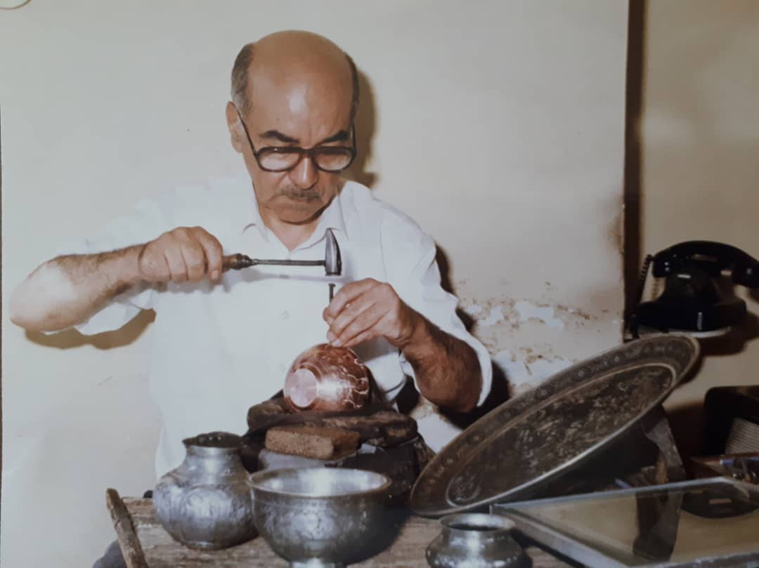 اثر قلم زنی سال 1362